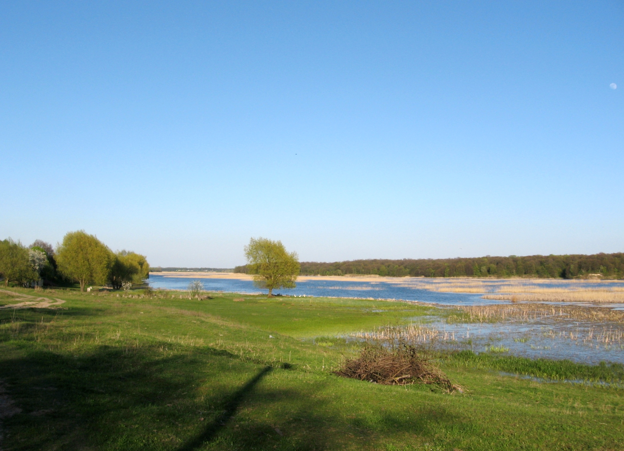 Стир під с. Шибин